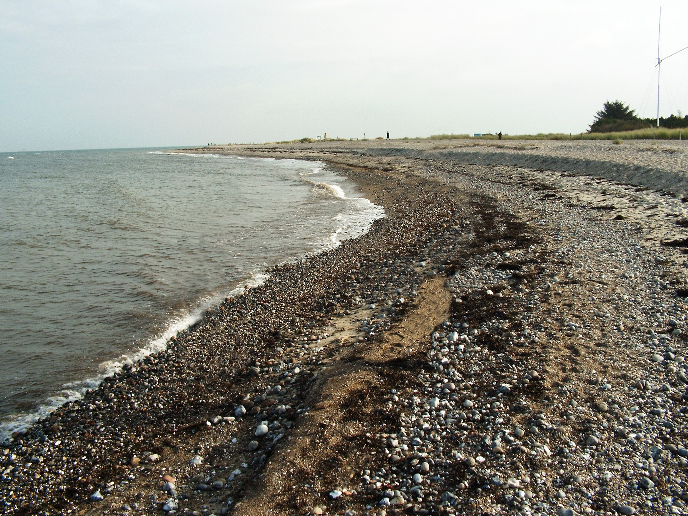 Fehmarns Nordküste bei Gammendorf (am Niobe-Denkmal)